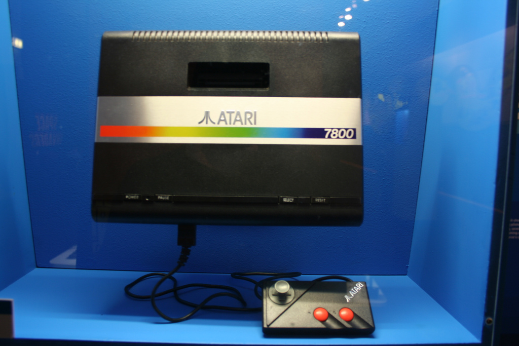 Atari 7800 console and controller.